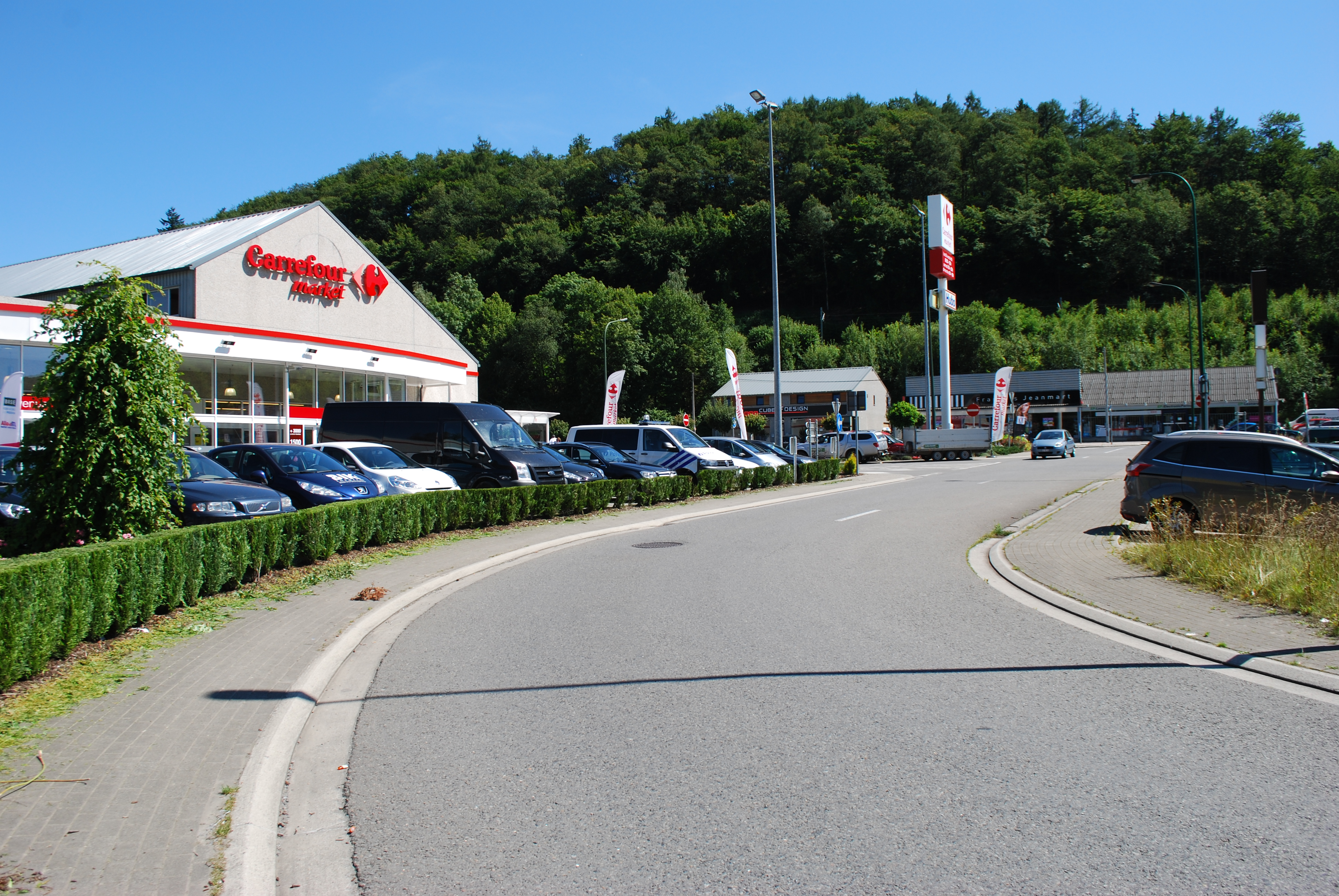 Vue des supermarchés de l'avenue de la Porallée à Aywaille.